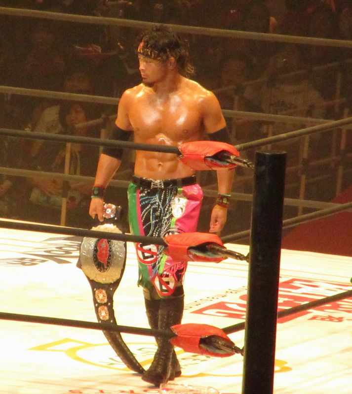 2016.11.3大阪